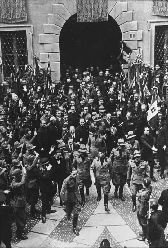 Die große politische Rede Mussolinis in Mailand ! Der italienische Diktator Mussolini begleitet von seinen Anhängern auf dem Domplatz in Mailand, begibt sich zur Tribüne. Information added by Wikimedia users.*